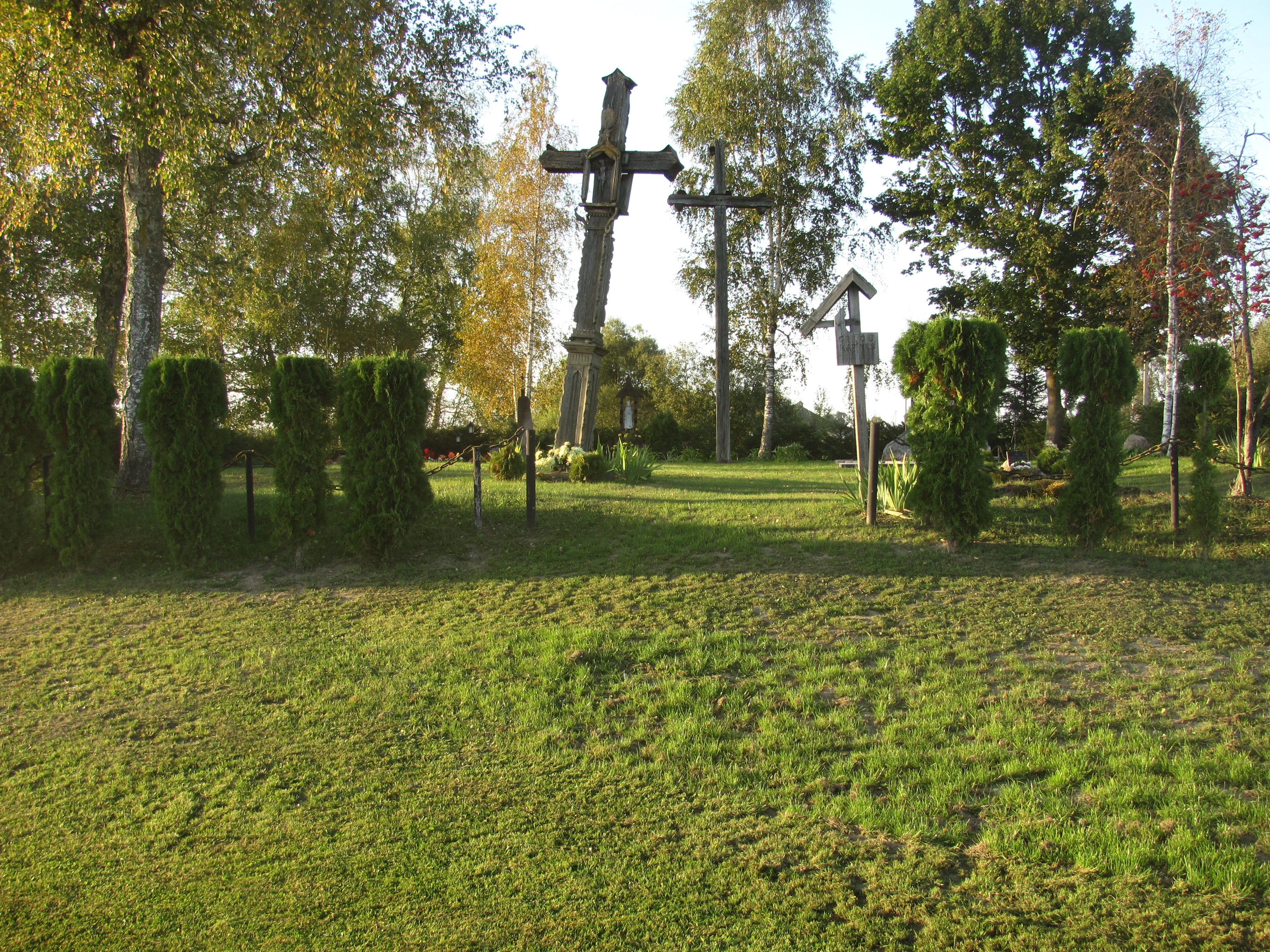 Griūtys 28123, Lithuania